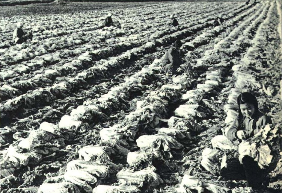 1963-10 1963年 白菜种植